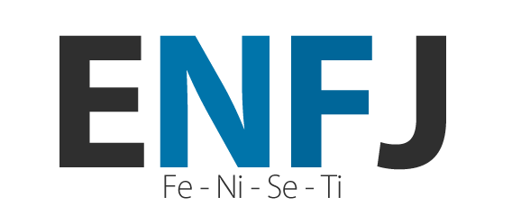 Arpetan: logo ENFJ MBTI.